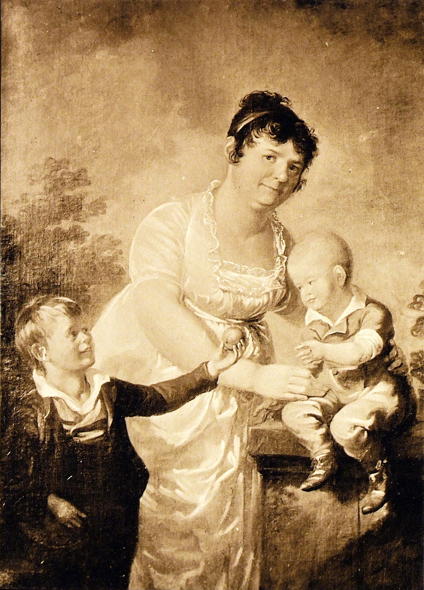 Alex. Laureus: Taiteilijan äitipuolen Mariana Juliana Winqvistin ja hänen kahden poikansa muotokuvat. (Portraits of artist's stepmother Mariana Juliana Winqvist and her two sons).